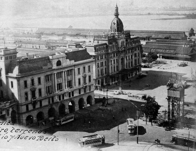 Vista panorámica de las tres estaciones Retiro en 1929